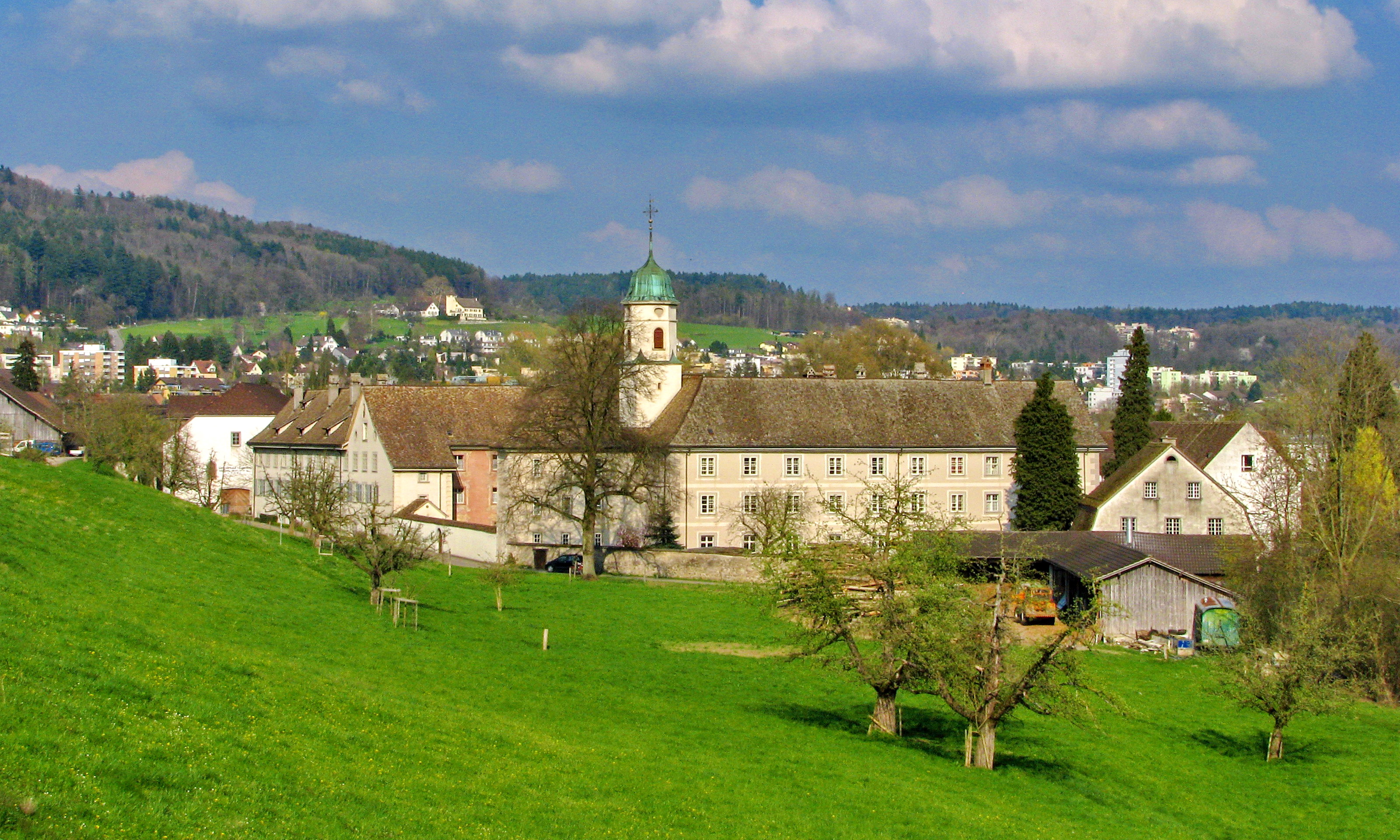 Kloster Fahr in Würenlos, Unterengstringen to the left, Limmattal in the background.